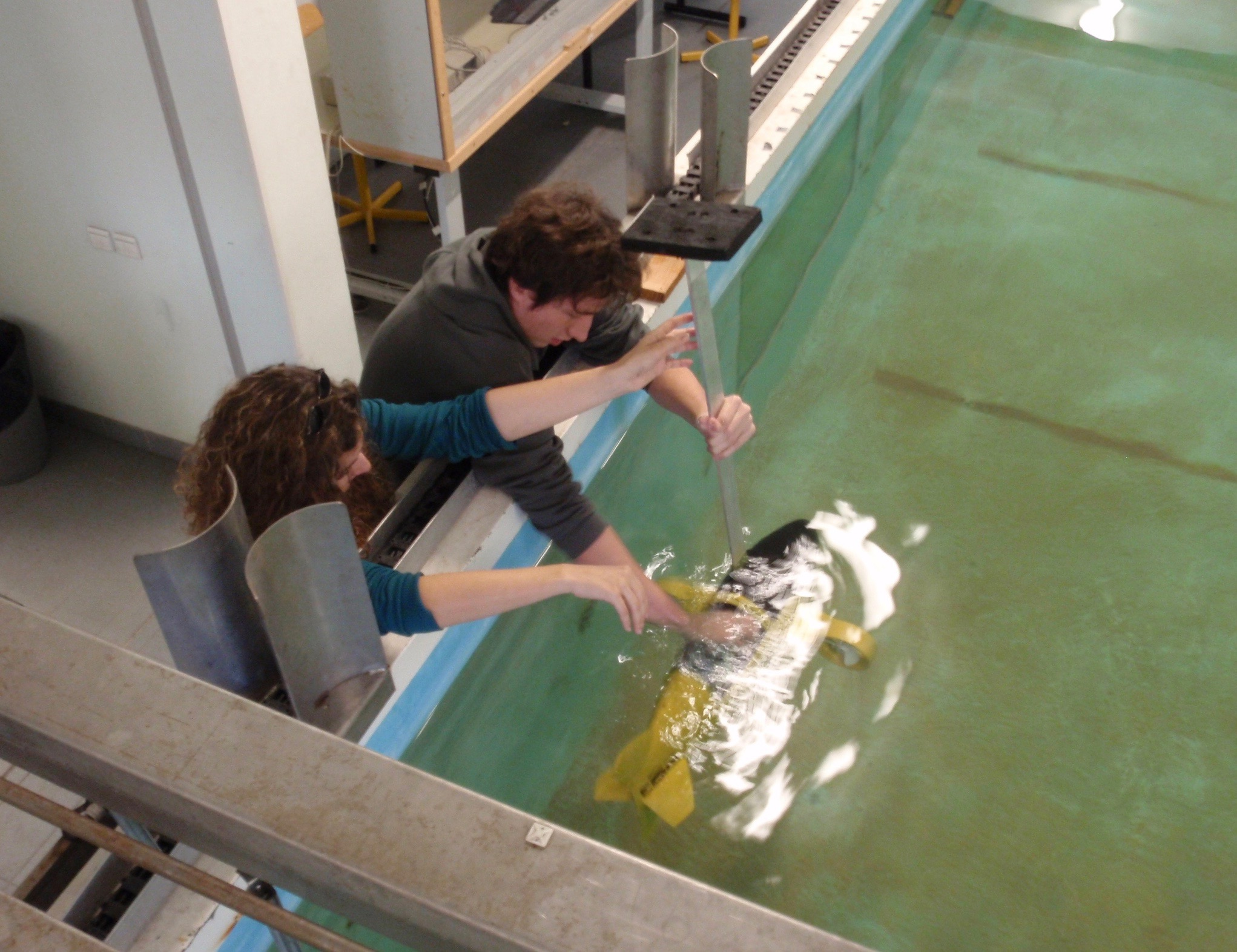 Maquette du sous-marin à propulsion humaine Scubster , Université de Toulon, Etude hydrodynamique en Bassin de carène